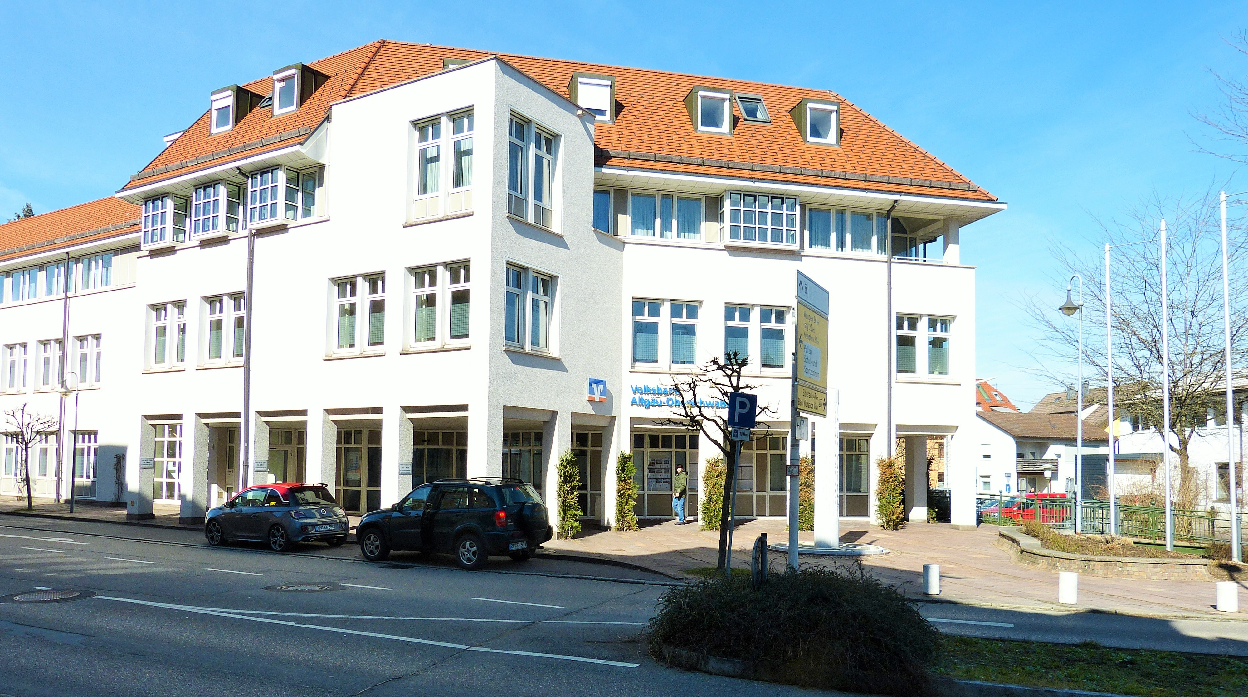 Leutkirch im Allgäu, 2020